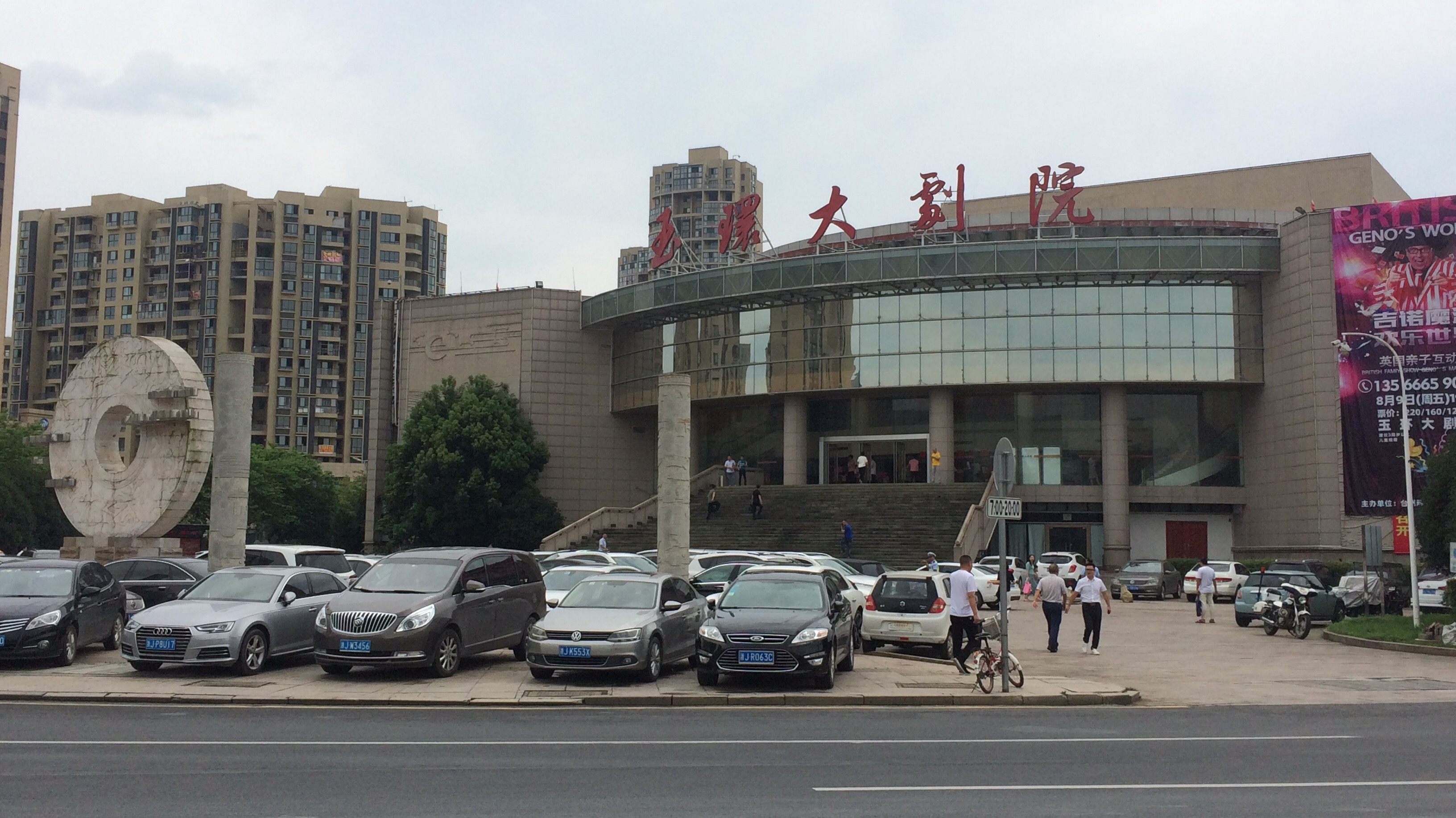 中文（中国大陆）: 2019年7月的玉环大剧院